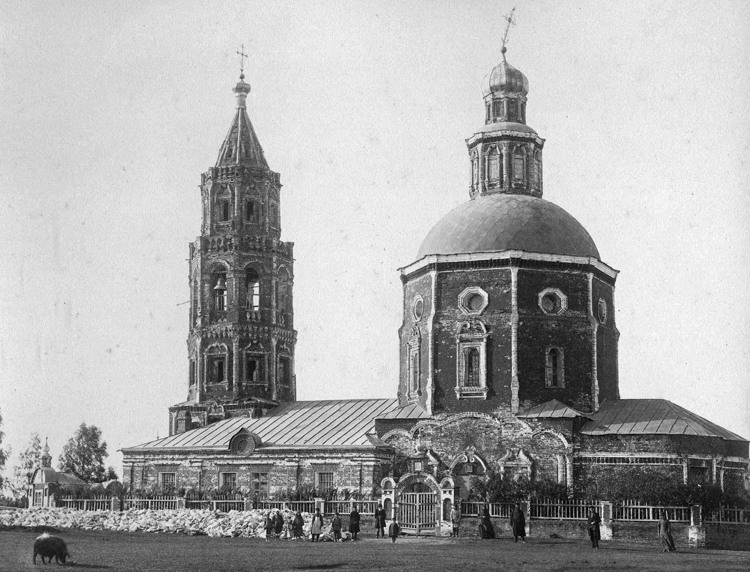 Неустановленная церковь в стиле нарышкинского барокко